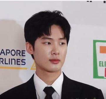 ’2019 올해의 브랜드 대상 시상식’ 레드카펫이 24일 오후 서울 중구 장충동 신라호텔 다이너스티홀에서 진행됐다.